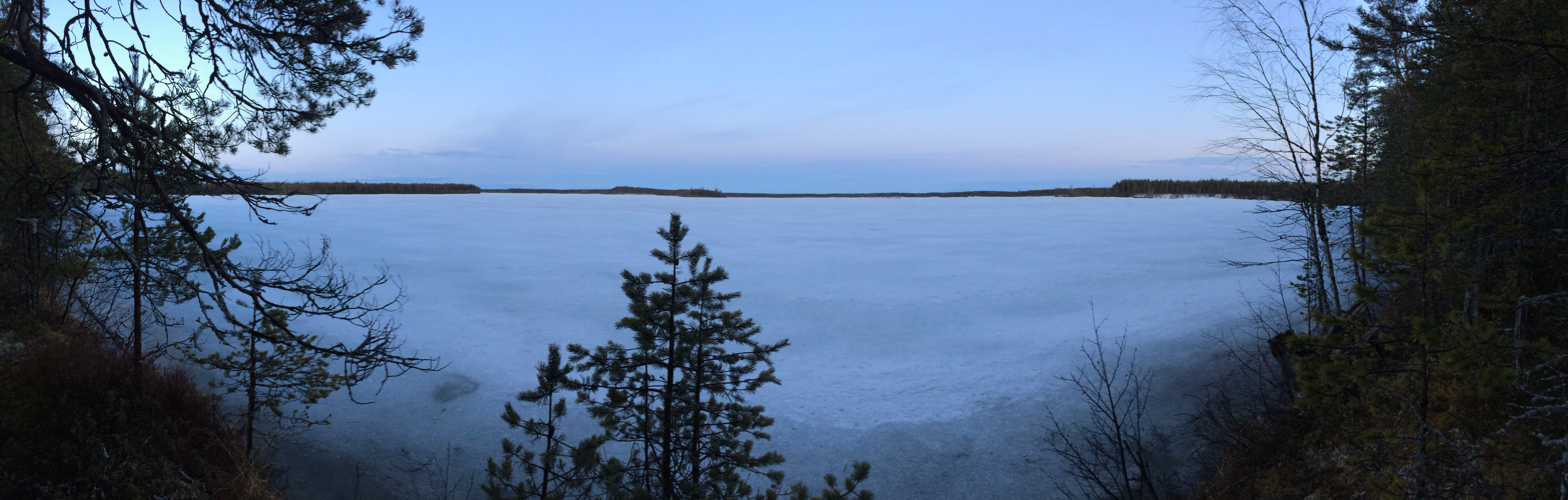 озеро Большое (Калевальский район)